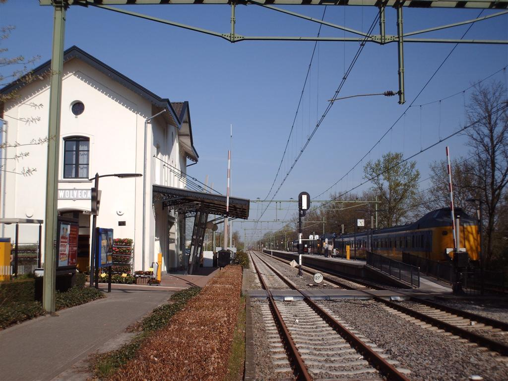 Spoorwegstation in Wolvega